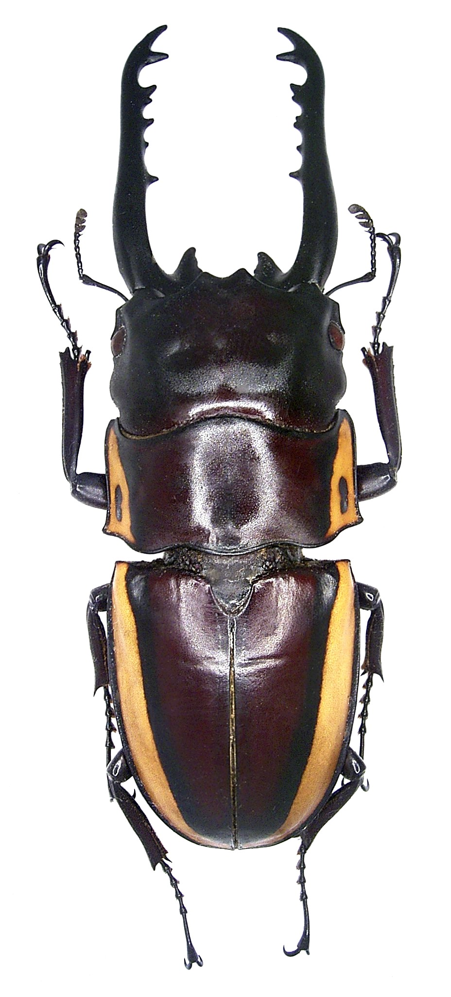 Familie: Lucanidae Grösse: 28,4-75,2 mm Fundort: Indonesien, Irian Jaya, Manokwari leg. 2007; det. A.Skale Foto: U.Schmidt, 2008